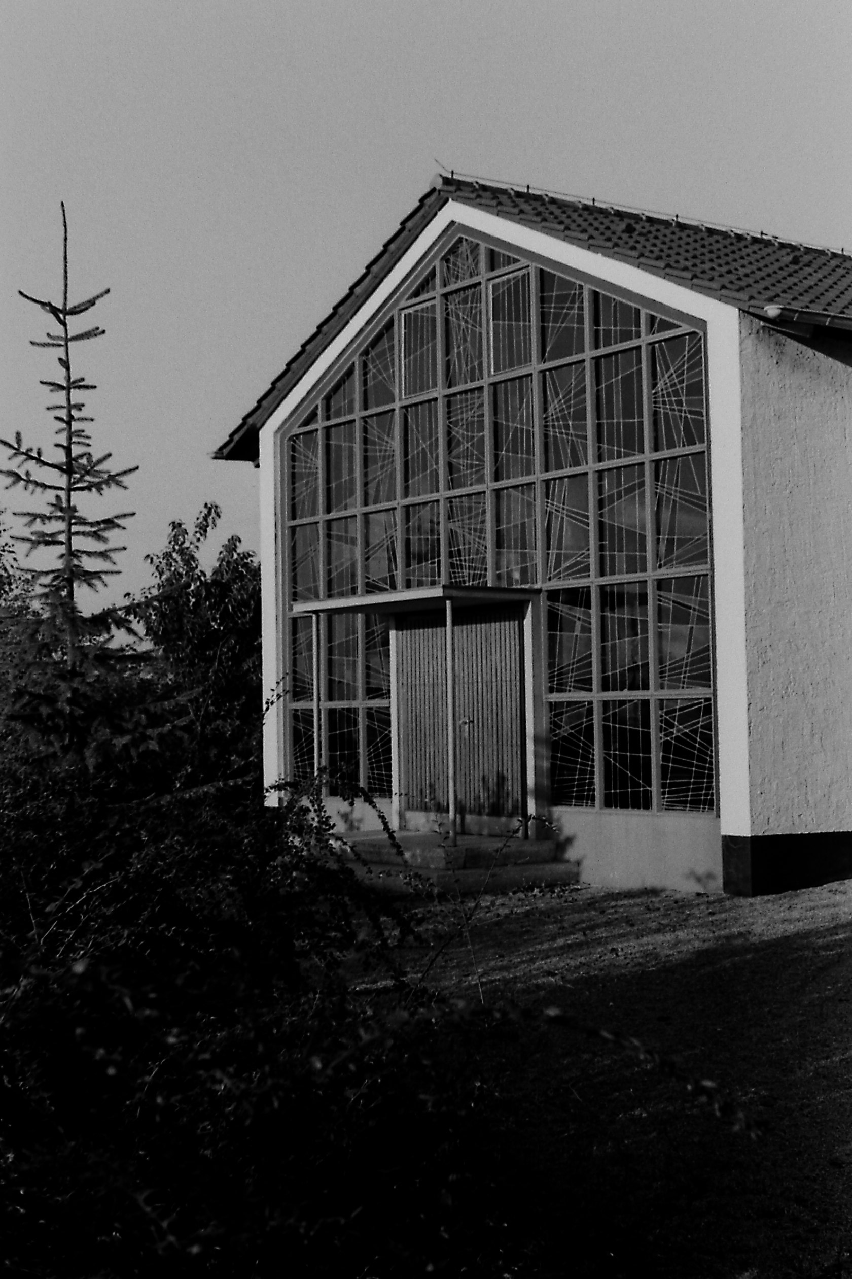 Deutschland (D) - Nordrhein-Westfalen (NW) - Kreis Lippe (LIP) - Bad Salzuflen - Wüsten, Berkenstraße: Trauerhalle des 'Neuen Friedhofs'